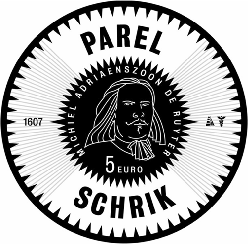 De beeldenaar van de zilveren vijf-euromunt en de gouden tien-euromunt die in 2007 worden uitgegeven ter gelegenheid van de 400ste geboortedag van Michiel de Ruyter is op de keerzijde: in een getande binnencirkel een portret van Michiel de Ruyter met daaronder de waardeaanduiding «5euro», onderscheidenlijk «10euro» en het omschrift «MICHIEL ADRIAENSZOON DE RUYTER», in een getande buitencirkel bovenin het woord «PAREL» en onderin het woord «SCHRIK», links het jaartal 1607 en rechts het teken van de Muntmeester en het teken van de Munt. De woorden op voor- en keerzijde vormen samen de tekst «ONZE PAREL HUN SCHRIK»